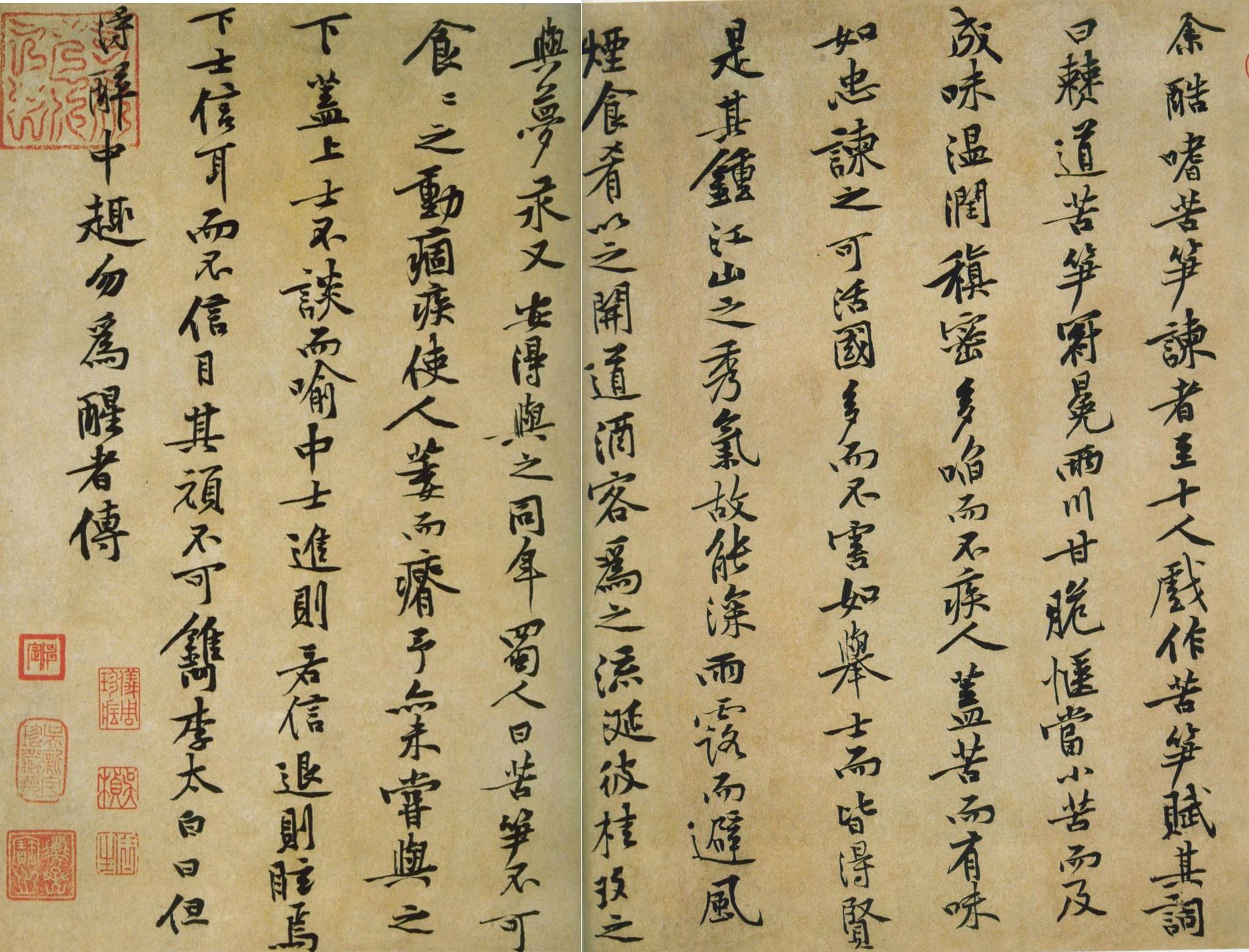 文言: 余酷嗜苦筍，諫者至十人，戲作苦筍賦。其詞曰：僰道苦筍，冠冕兩川，甘脆愜當，小苦而及成味，溫潤稹密，多啗而不疾人。蓋苦而有味，如忠諫之可活國；多而不害，如舉士而皆得賢。是其鐘江山之秀氣，故能深雨露而避風煙，食肴以之開道，酒客為之流涎，彼桂玫之與夢汞，又安得與之同年。蜀人曰：苦筍不可食，食之動痼疾，使人萎而瘠。予亦未當與之下。蓋上士不談而喻；中士進則若信，退則眩焉，下士信耳，而不信目，其頑不可裯。李太白曰：“但得醉中趣，勿為醒者傳。”